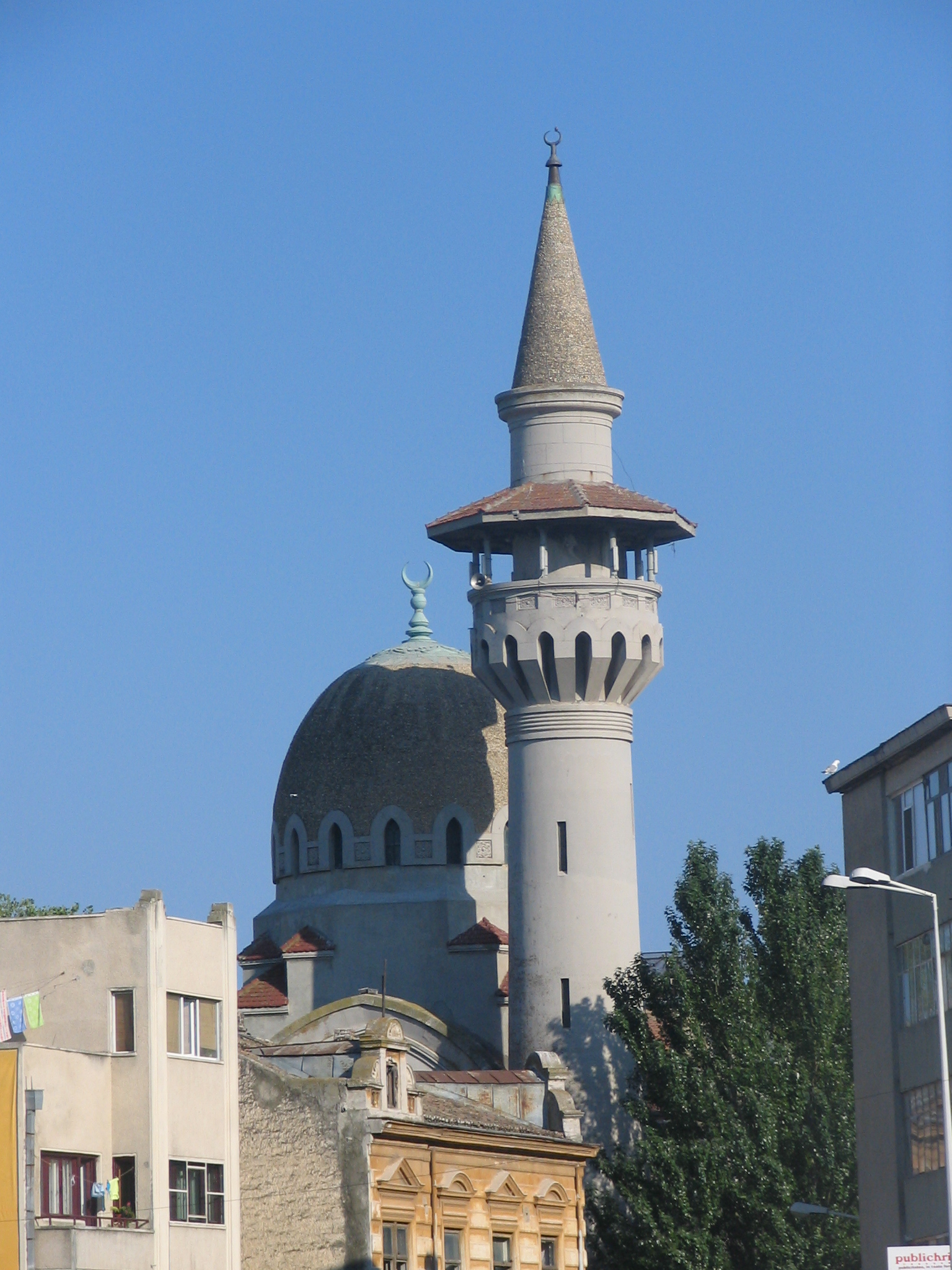 Moscheea Carol I, Constanta